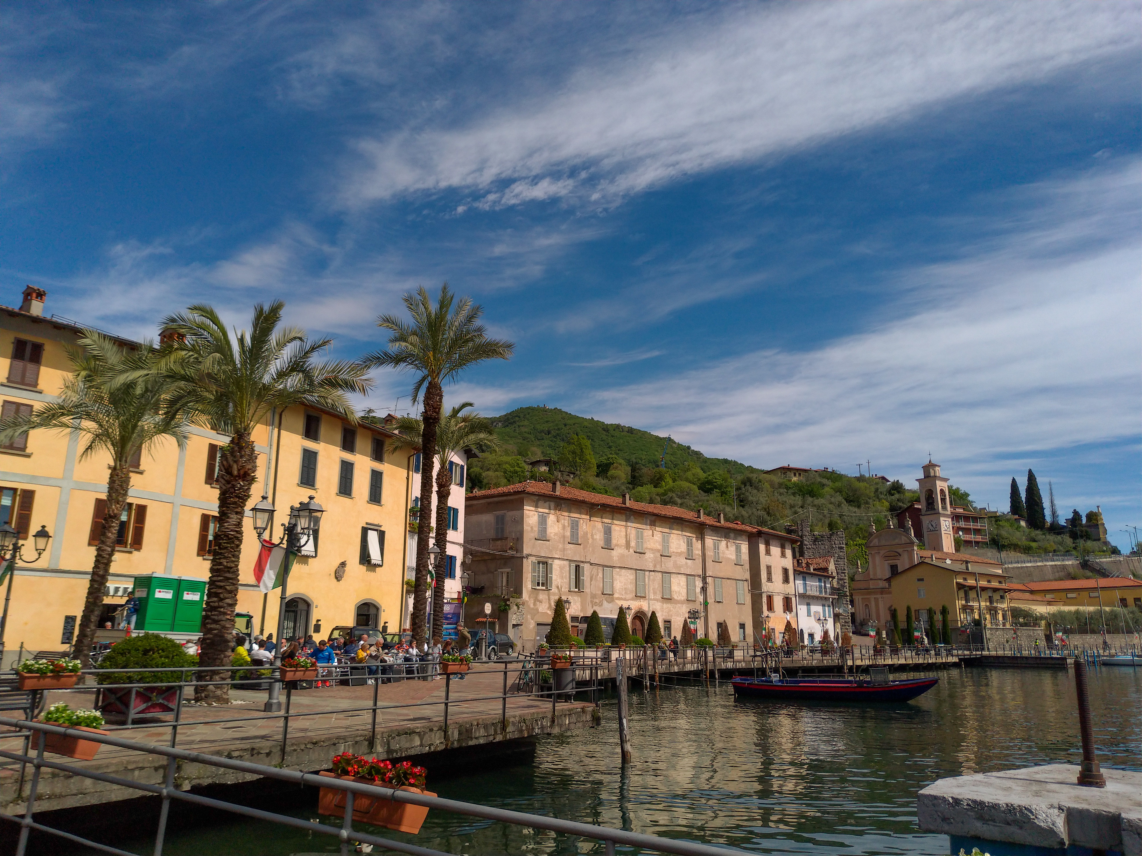 Riva di Solto, Bergamo, Italy